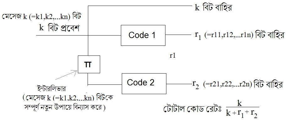 explaning turbo code in bengali